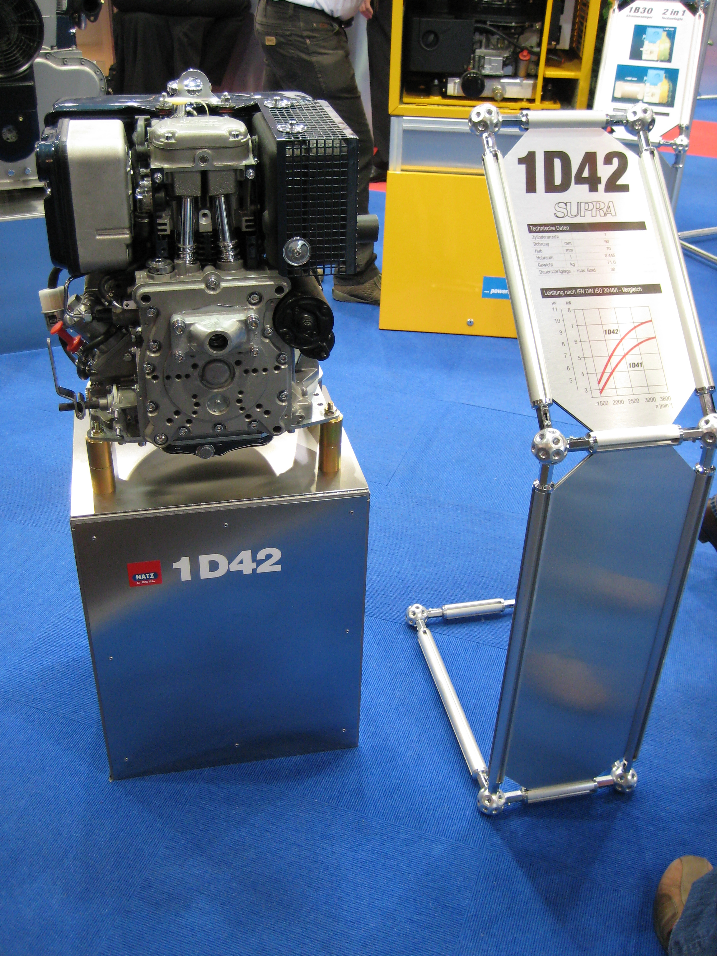 BAUMA 2007, Hatz Diesel 1D42